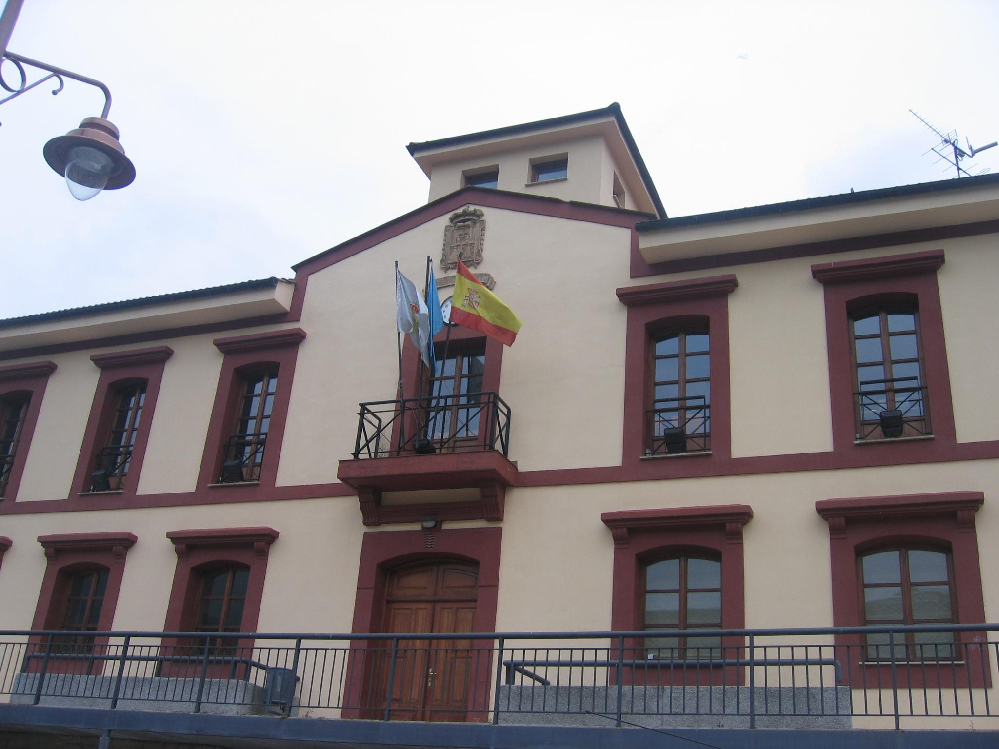 Fotografía del Ayuntamiento de Quirós en la localidad de Bárzana.